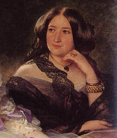 Linden d'Hooghvorst (Pauline van der) Eugénie von Frankreich mit ihren Hofdamen